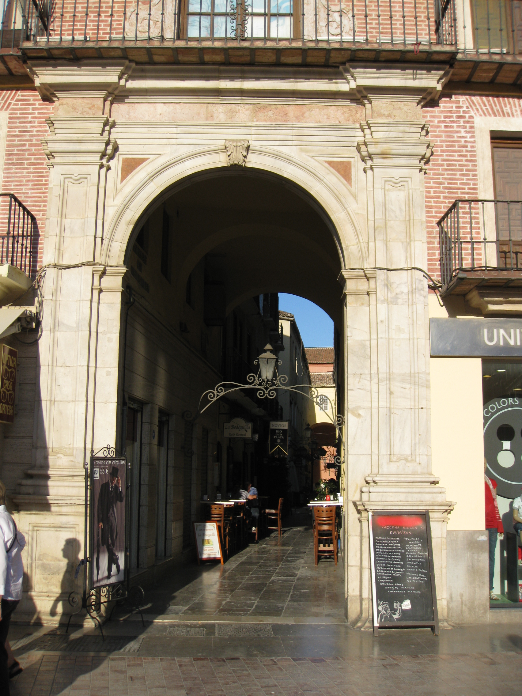 Entrada al Pasaje Chinitas, Málaga, España